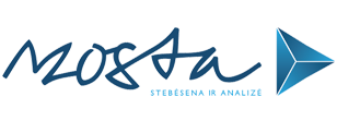 MOSTA logotipas